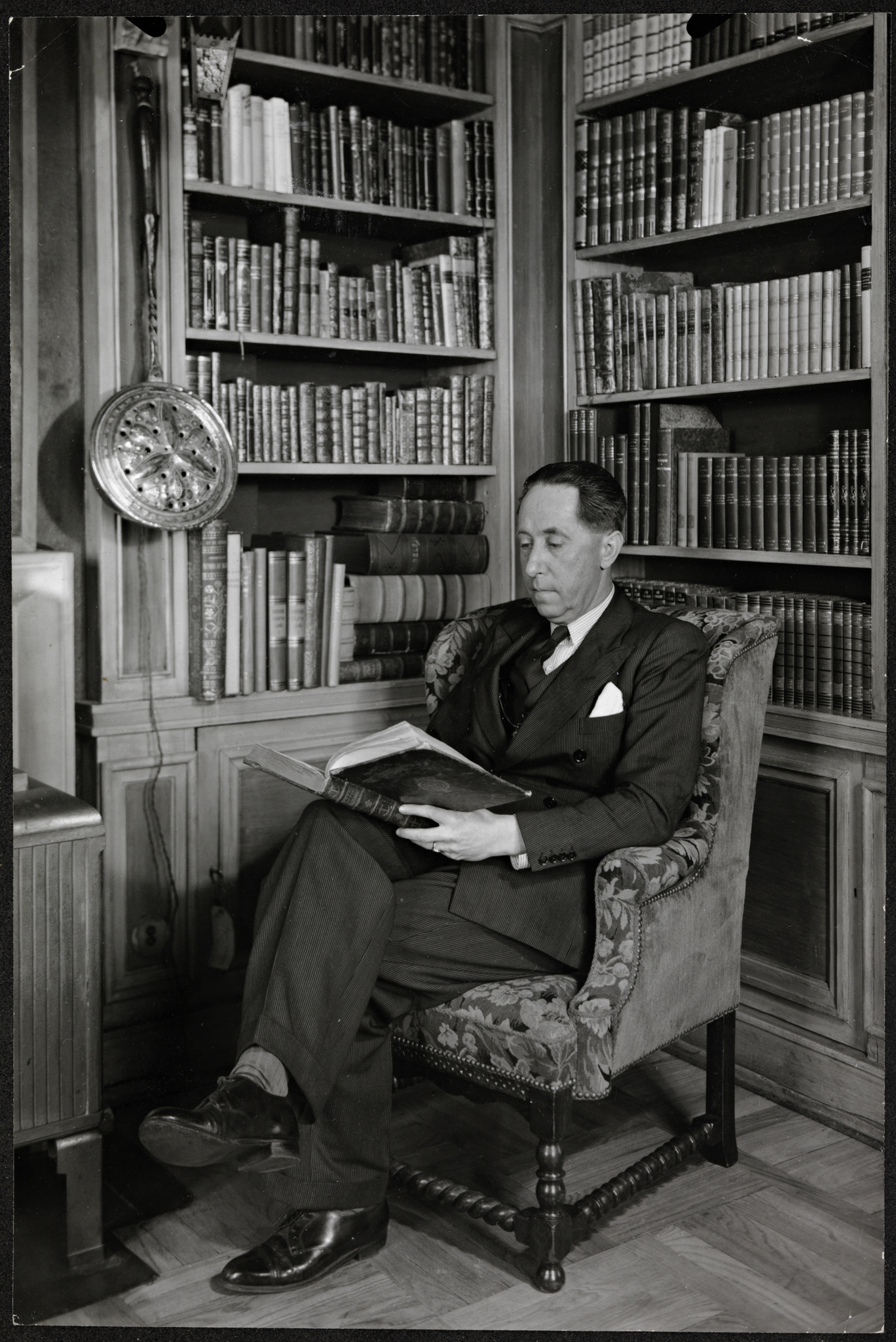 Tittel / Title: Portrett av journalist Carl Huitfeldt i sitt bibliotek Beskrivelse / Description: Bibliofilklubben, forening av bokvenner, stiftet i Oslo 13. mars 1922 med det formål å virke for fremme av bibliofili, bokhistorie og interessen for vakre bøker samt være et bindeledd mellom norske bokvenner. Medlemstallet er begrenset til 33. Dato / Date: 1942 Fotograf / Photographer: K. Teigen Eier / Owner Institution: Nasjonalbiblioteket / National Library of Norway Lenke / Link: Bildesignatur / Image Number: blds_05792